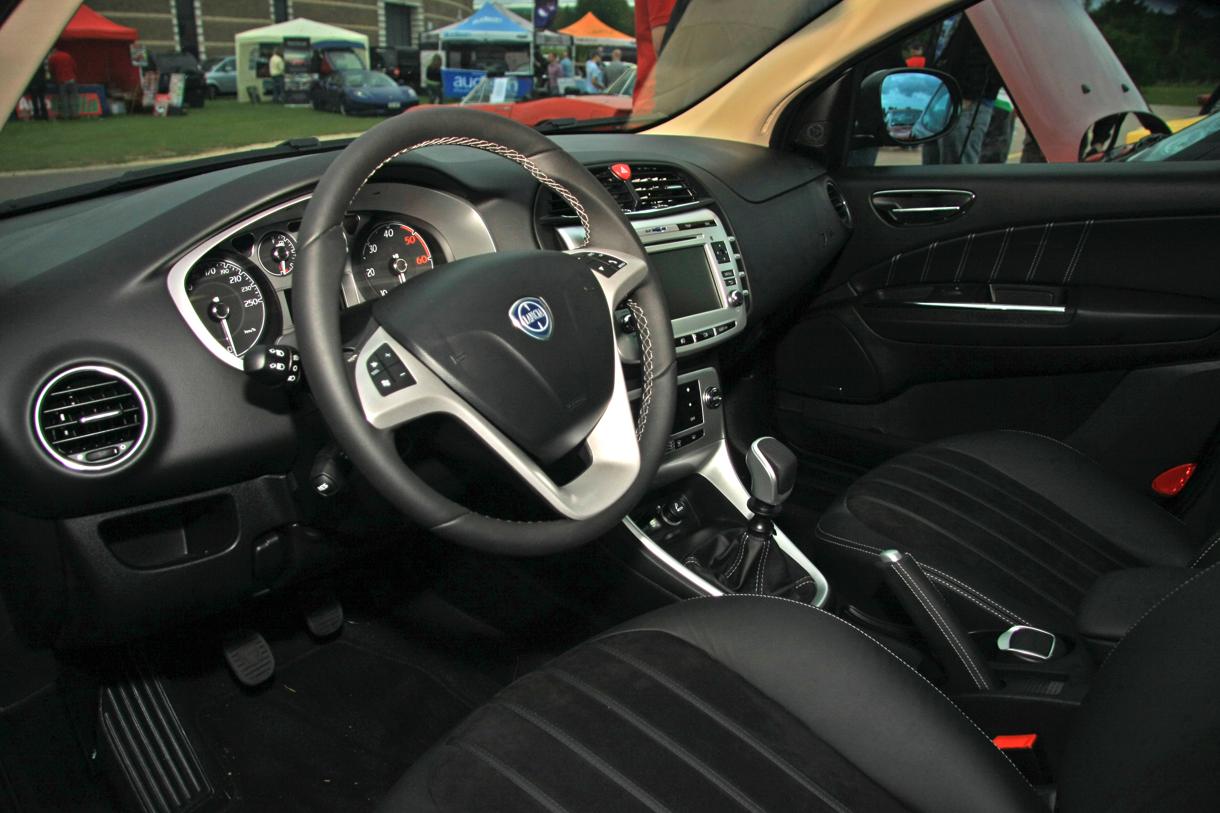 Interni di una Lancia Delta (2008) ( Alcantara ? )